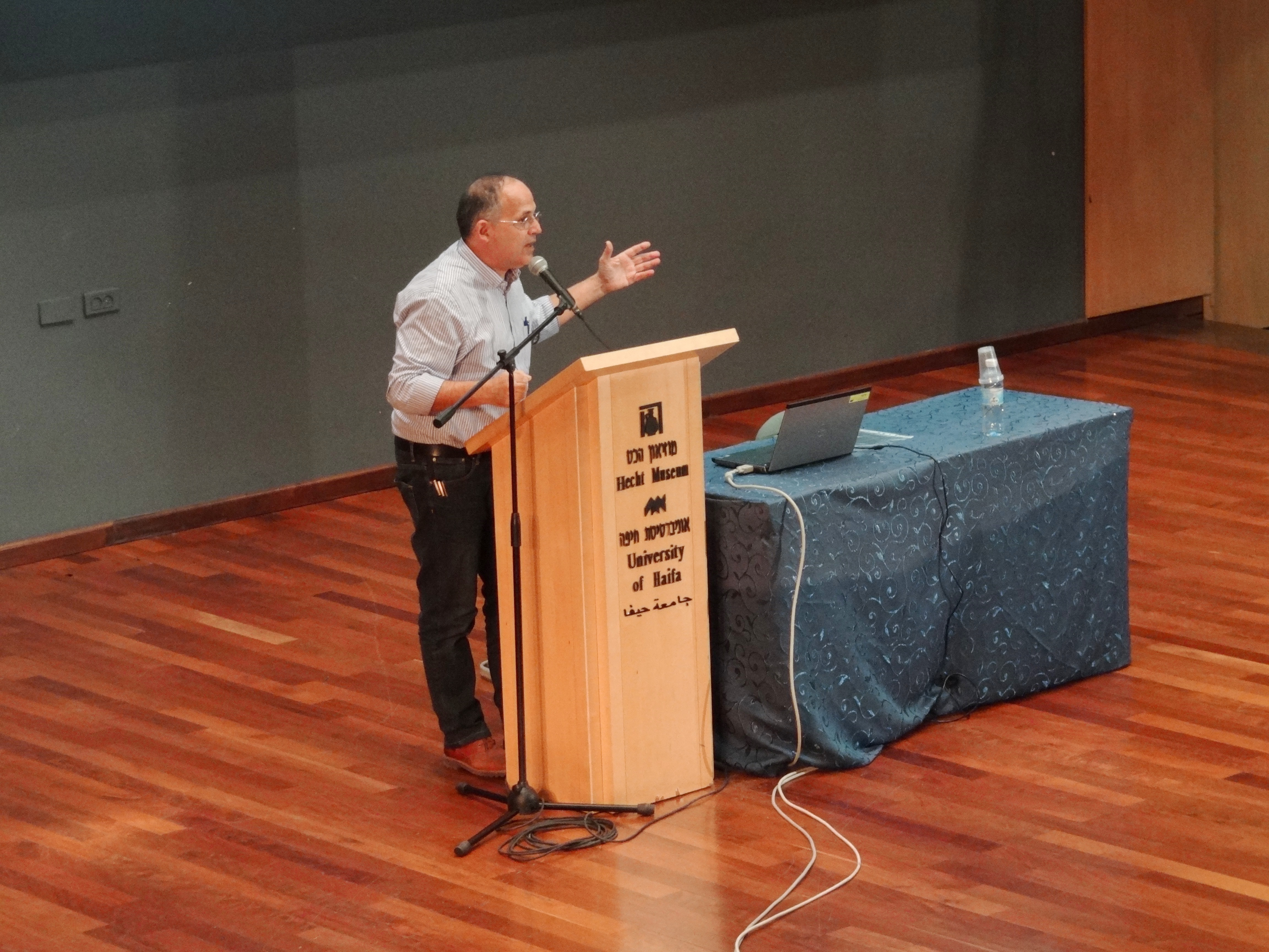 פרופסור מוטי גולני הוא היסטוריון ישראלי של תקופת המנדט ומדינת ישראל היה מרצה באוניברסיטת חיפה וראש החוג ללימודי ארץ ישראל. מרצה באוניברסיטת תל אביב מרצה על גולדה מאיר במסגרת סדרת הרצאות על נשים ופועלן שמתקיימת בתוכנית ללימודי נשים ומגדר באוניברסיטת חיפה ראו כאן.